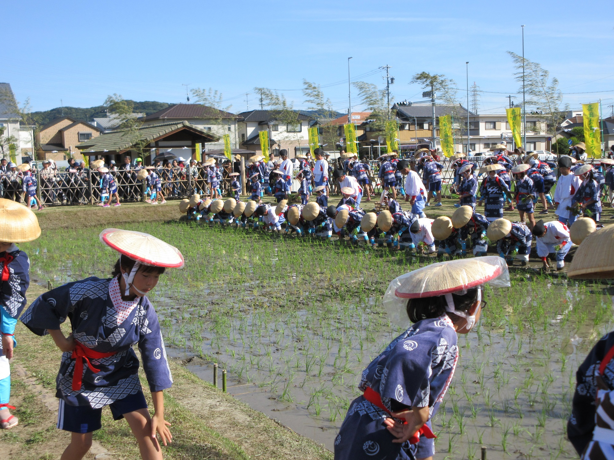 悠紀斎田お田植えまつり（岡崎市中島町）